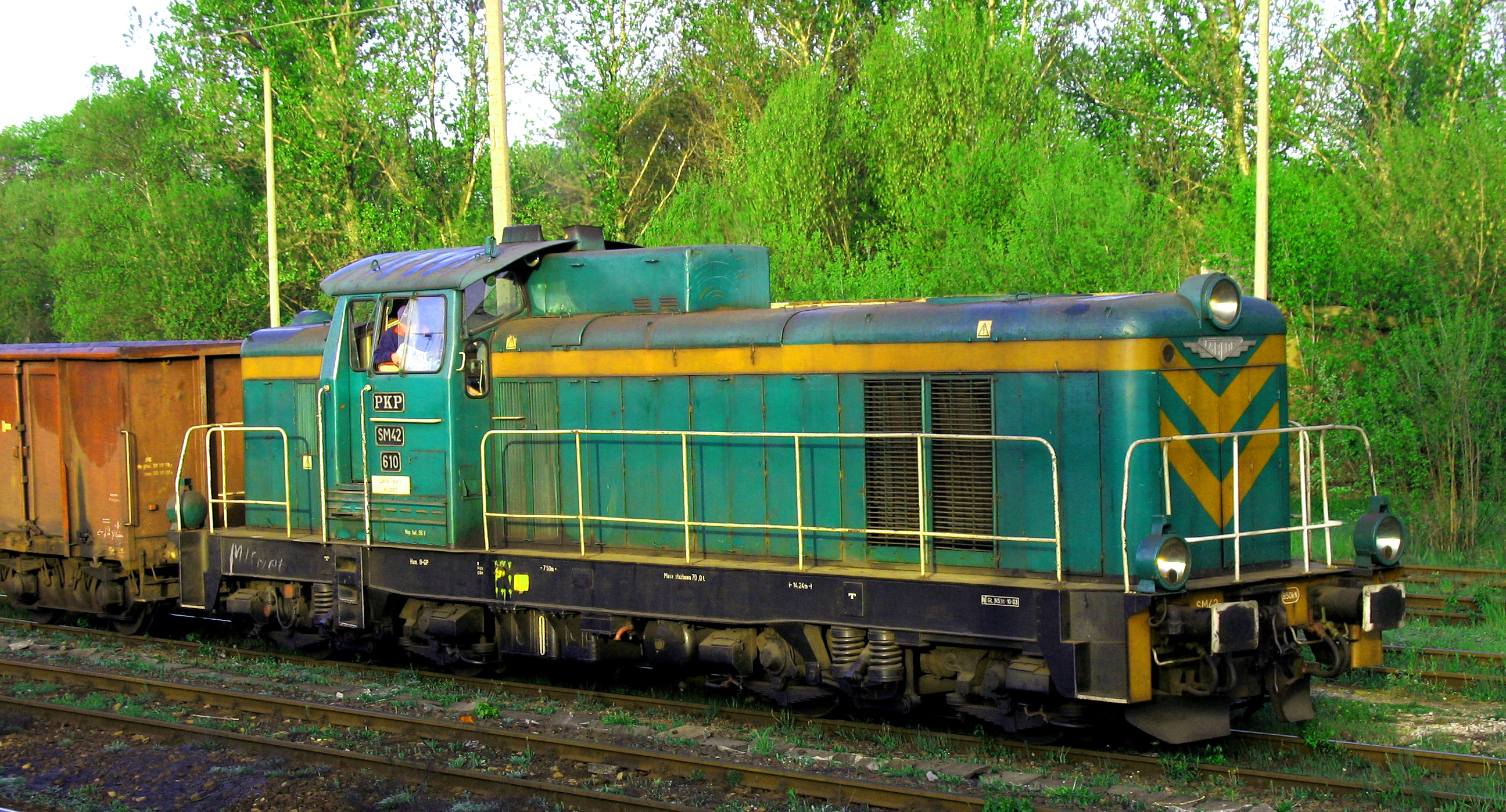 SM42-610 locomotive